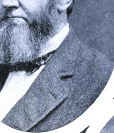 Main suit detail - notch lapel.